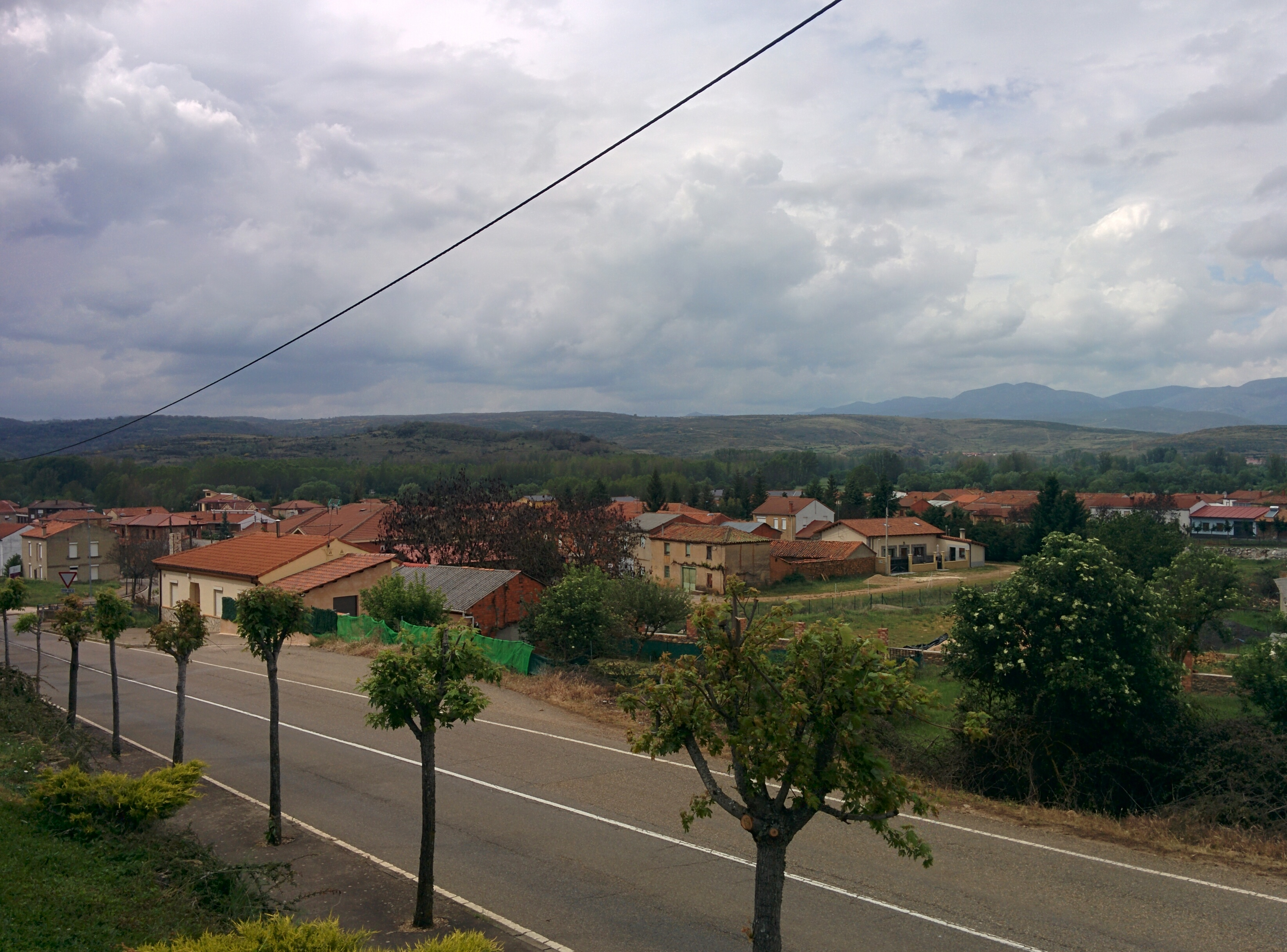 Vista general de Rioseco de Tapia (León, España).